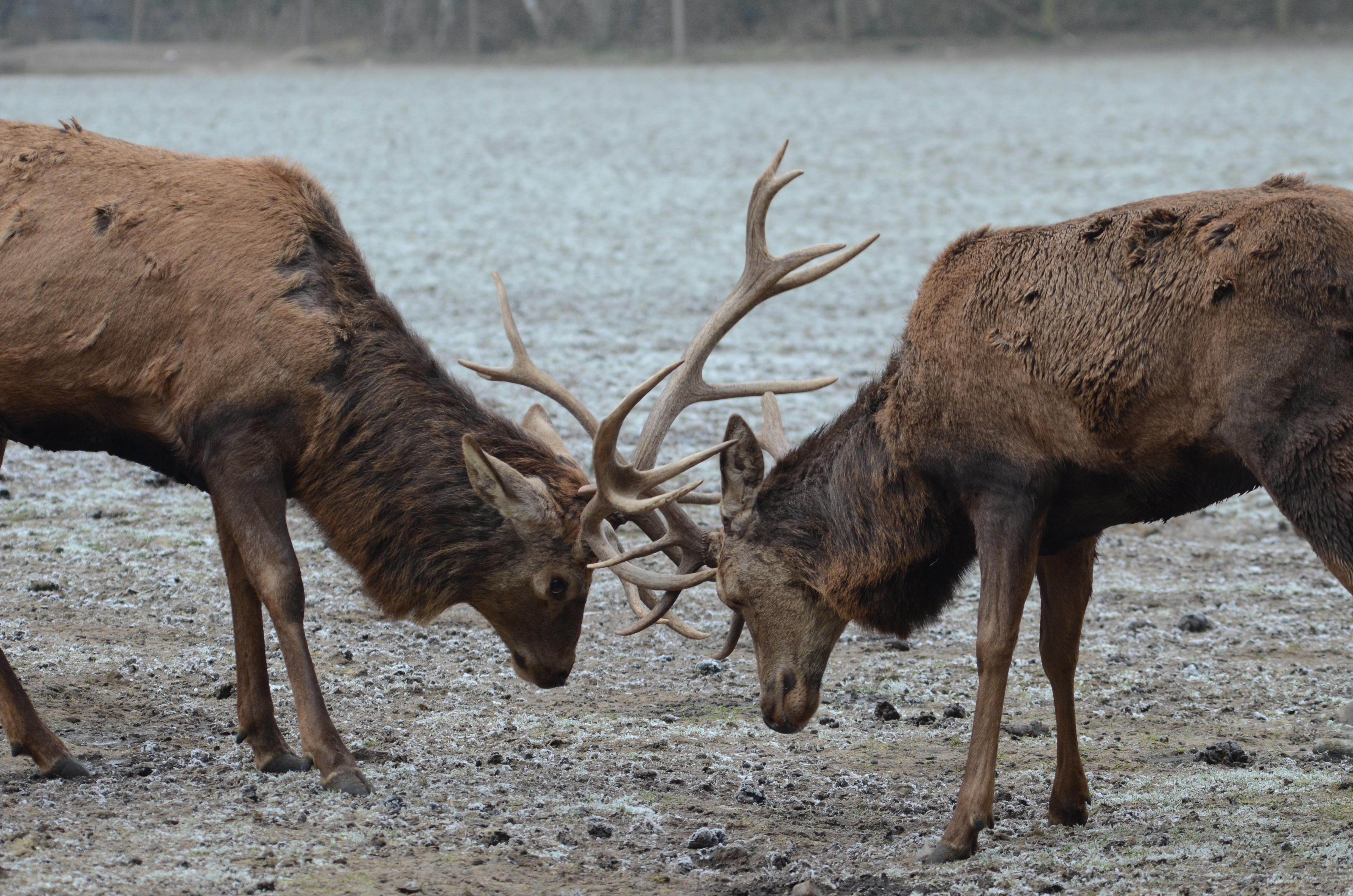 red deer